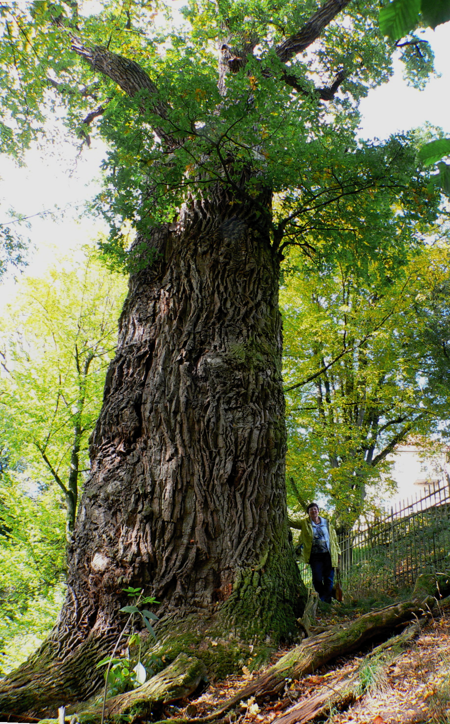 1000jährige Eiche in Küps-Nagel, Bayern, Regierungsbezirk Oberfranken, Landkreis Kronach